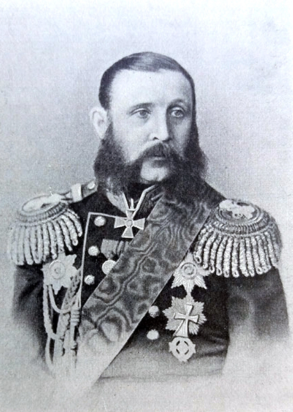 Генерал-адъютант Грейг Самуил Алексеевич